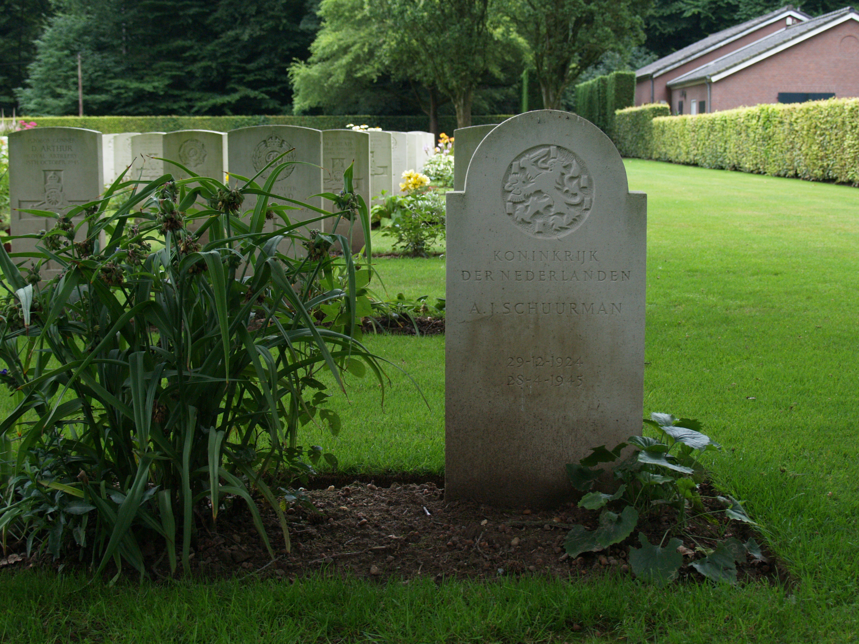 Reichswald Forest War Cemetery - Nederlands graf